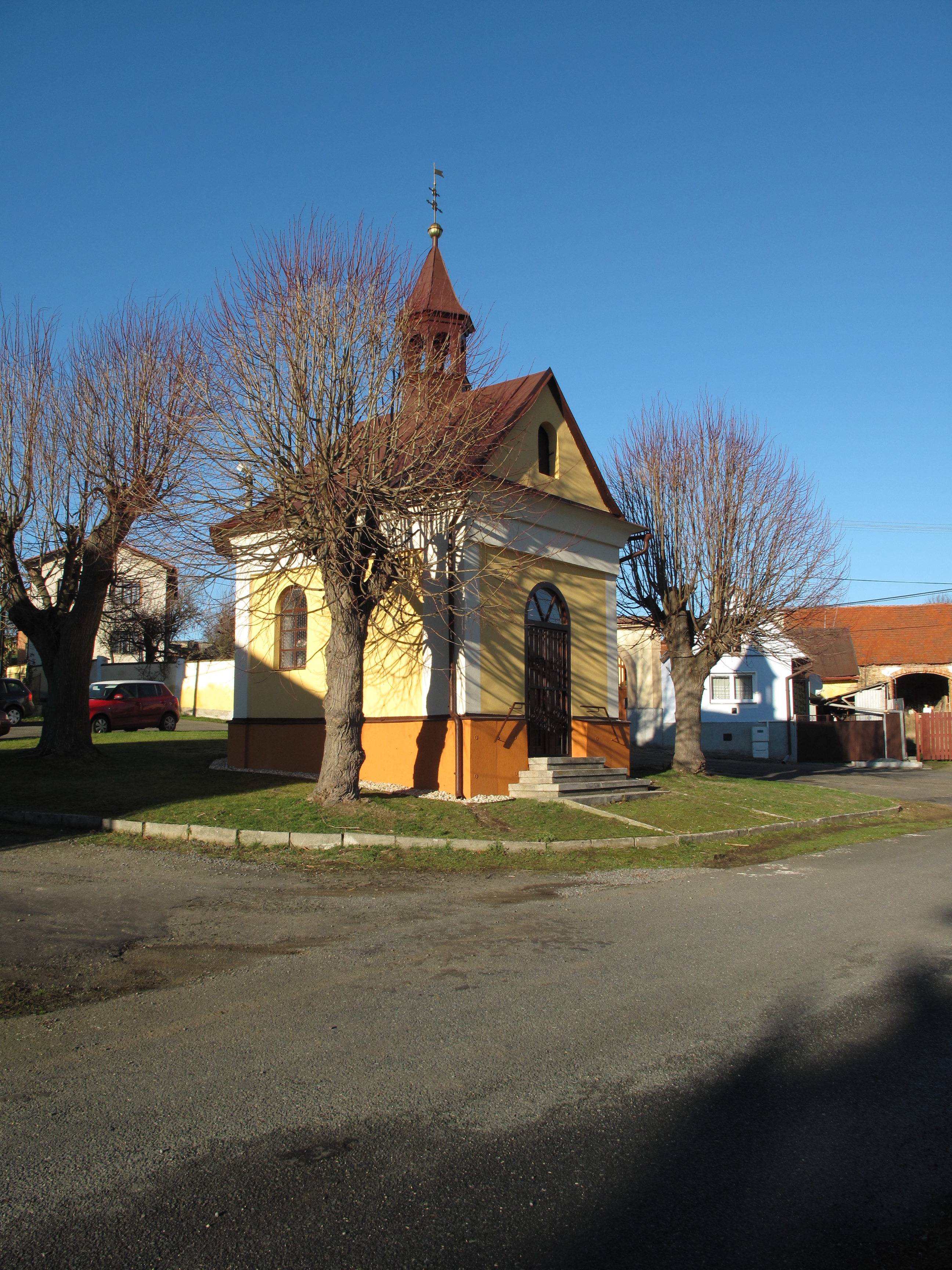 Kaplička ve Strýčkovicích. Okres Domažlice, Česká republika.